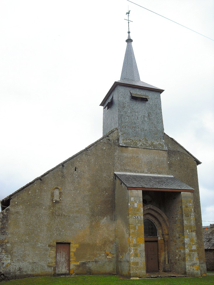 Église Saint-Pierre et Saint-Paul d'Alluy